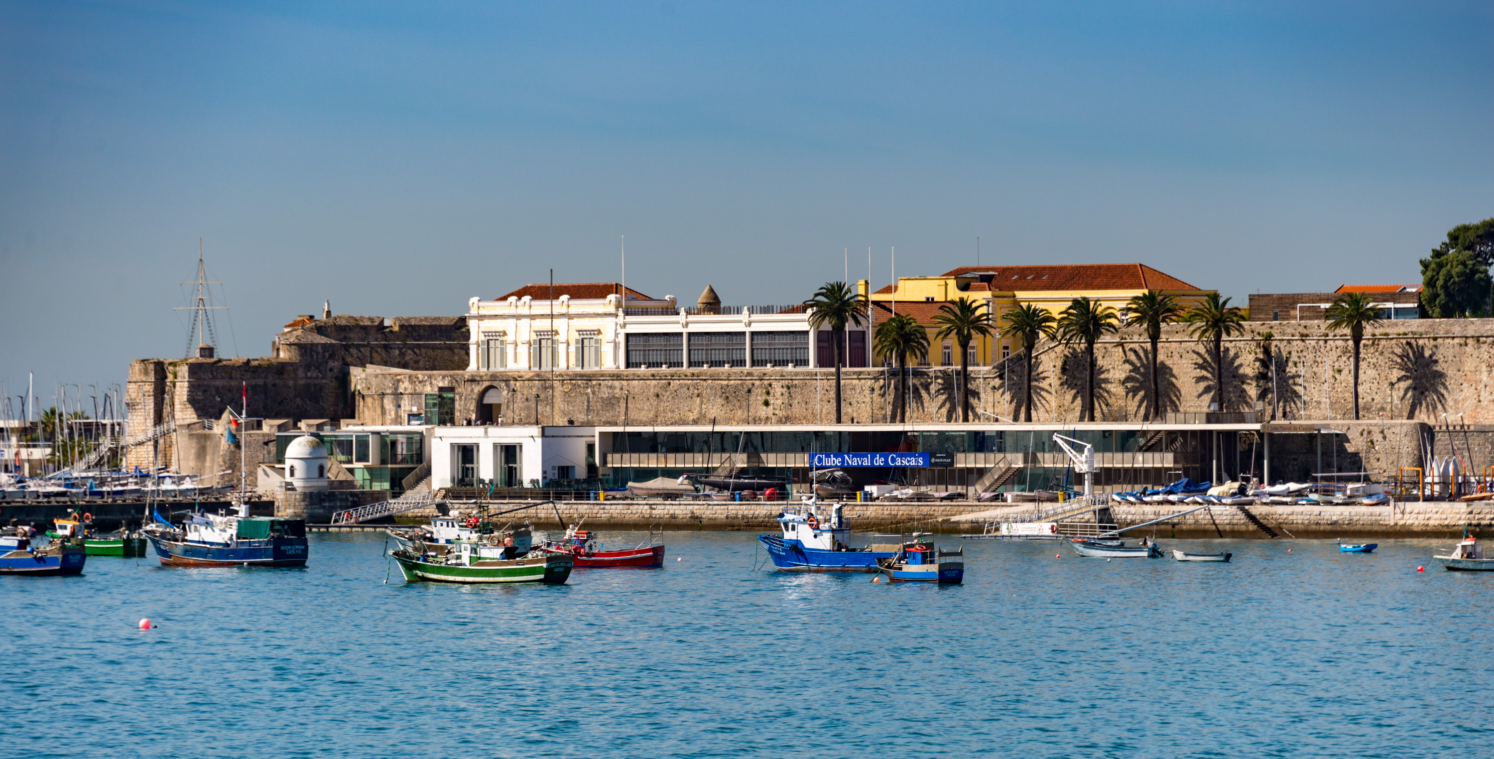 33033-Lisbon